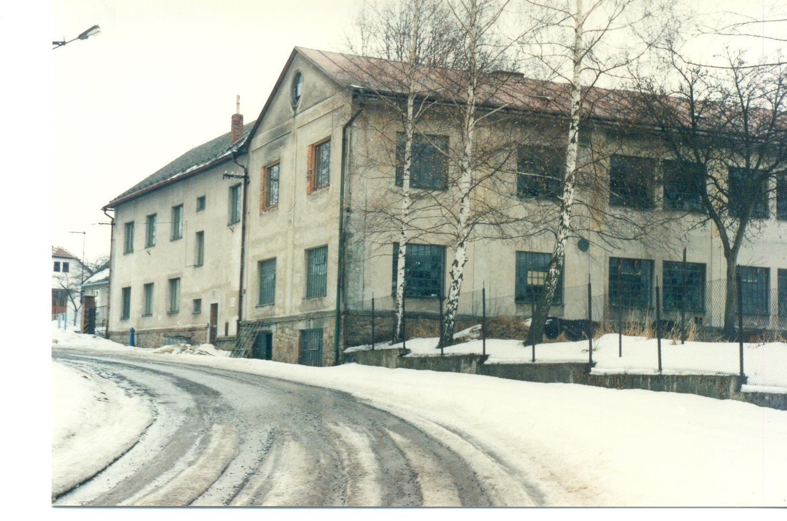 Pohled na kožedělnou továrnu založenou Rudolfem Schönbachem v Černovicích u Tábora.